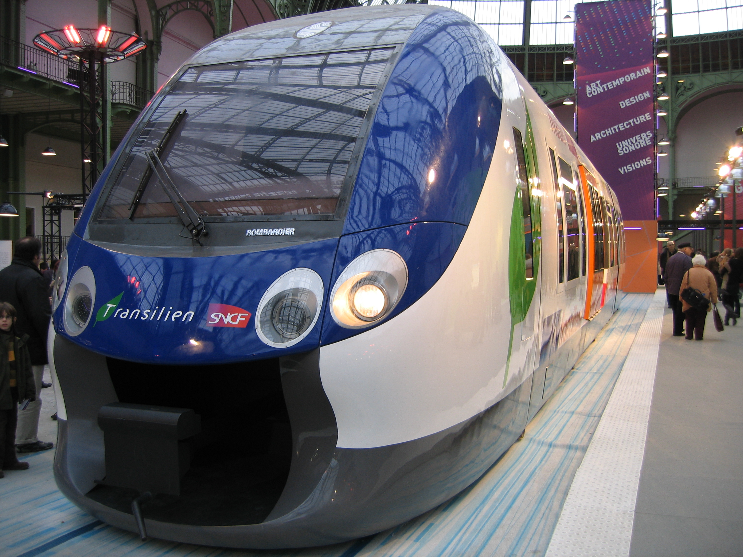 Maquette du Francilien (Z 50000) exposée en 2008.